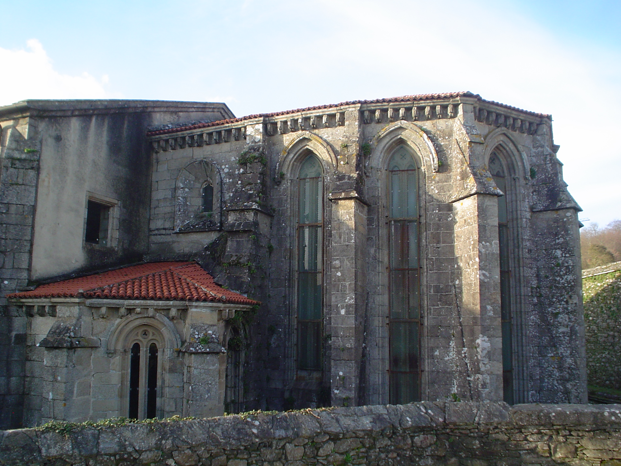 Ábsida gótica da igrexa do convento de San Domingos de Bonaval - Santiago de Compostela